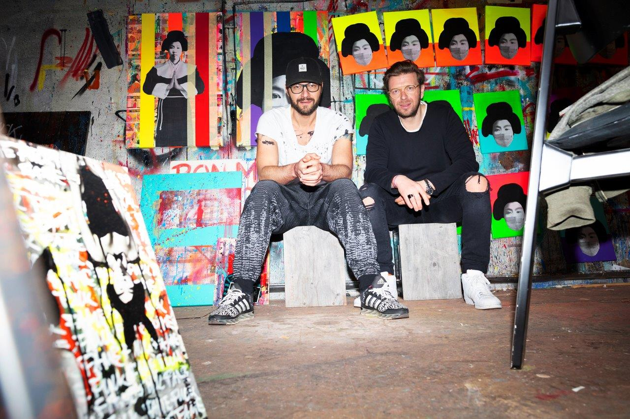 Ronny Kindt und Marcus Klüh vom dem Künstlerduo Ron Miller aus Berlin